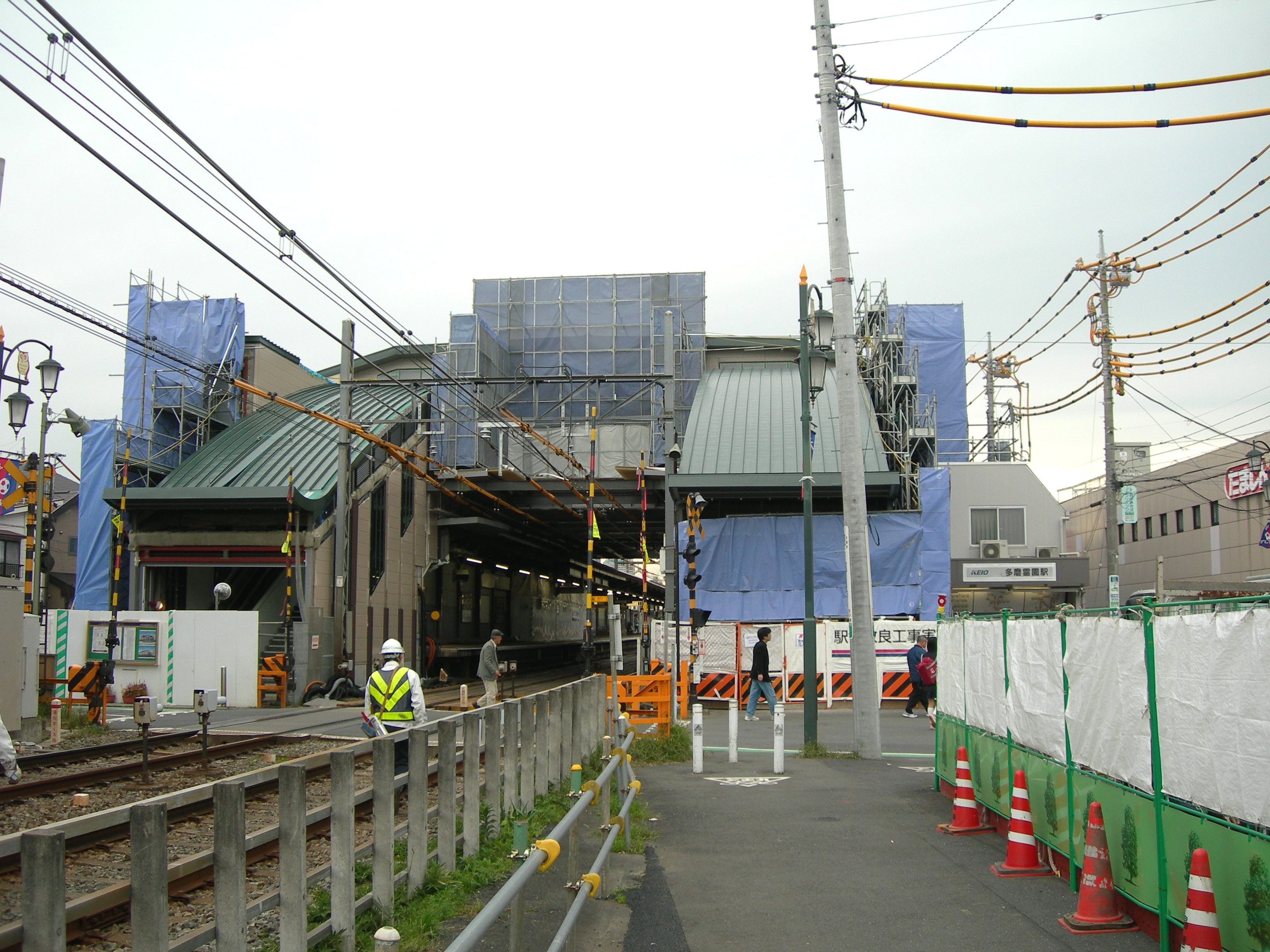 多磨霊園駅